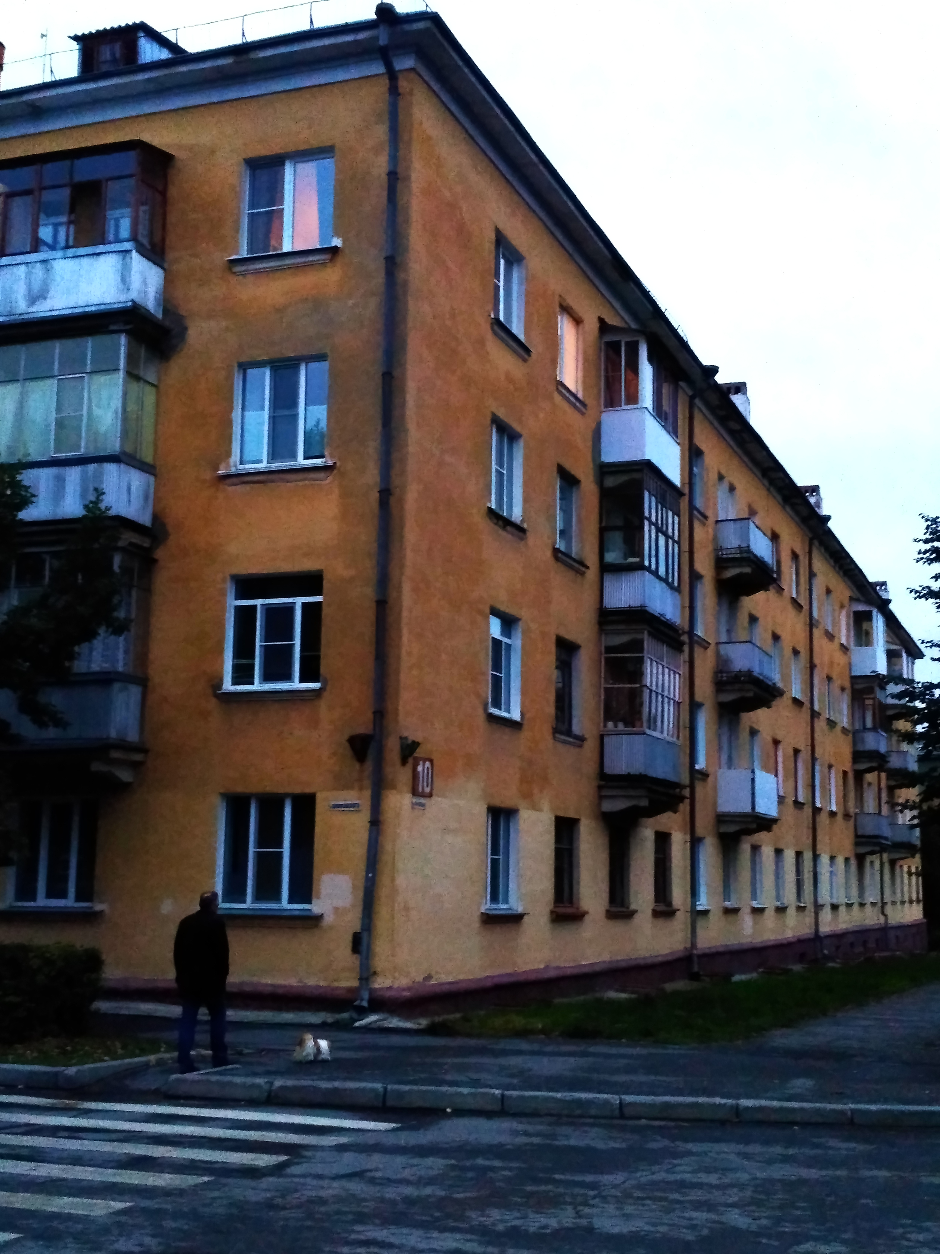 Дом, где жил Яненко Н. Н.: улица 40 лет Октября, 10, Снежинск, Снежинский городской округ, Челябинская область